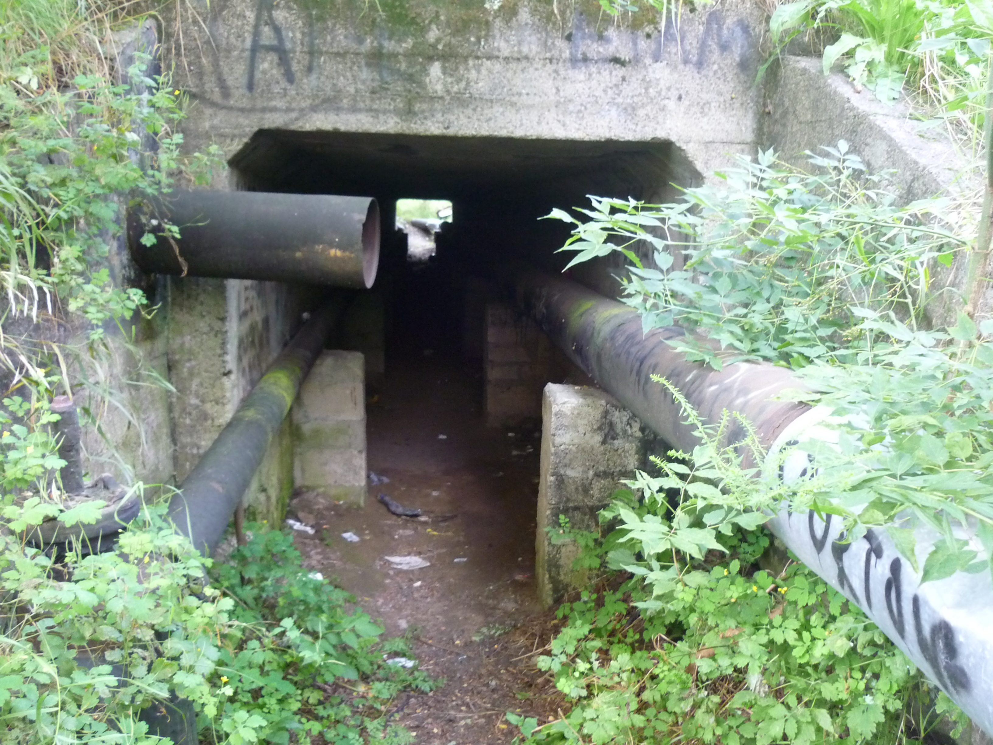 Zielinka, tributary of Cybina, Poznań, Poland